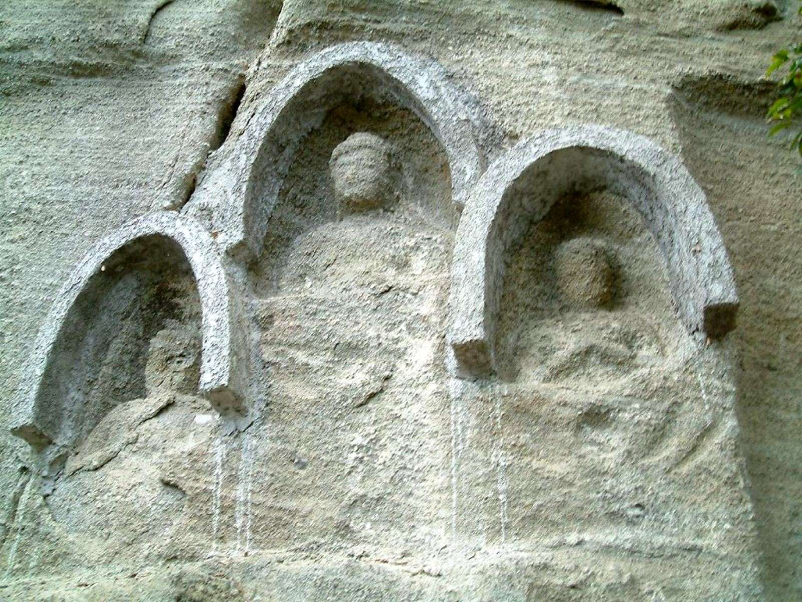 弥谷寺の摩崖仏